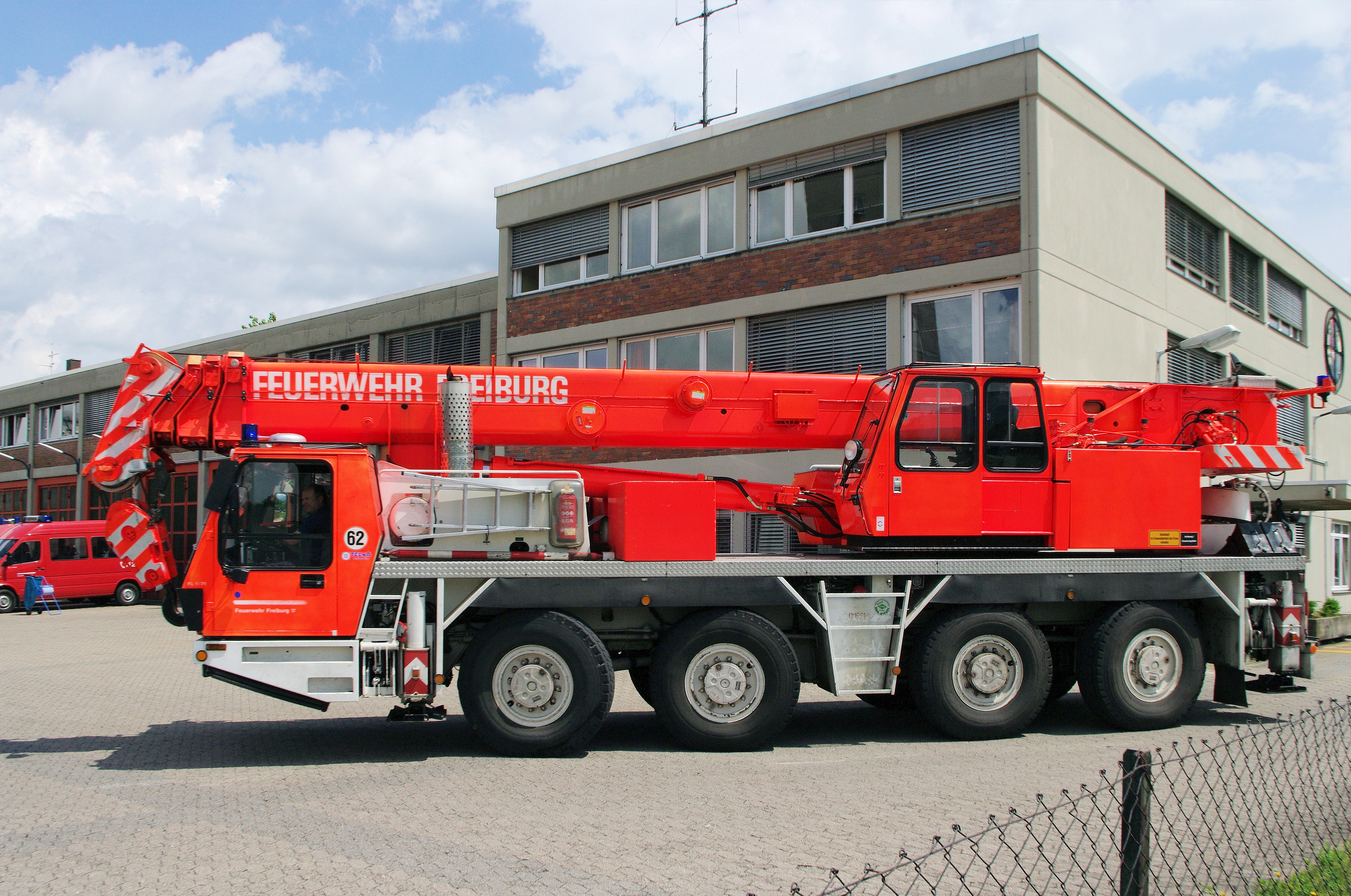 Hauptwache der BF Freiburg Sondefahrzeug Kran